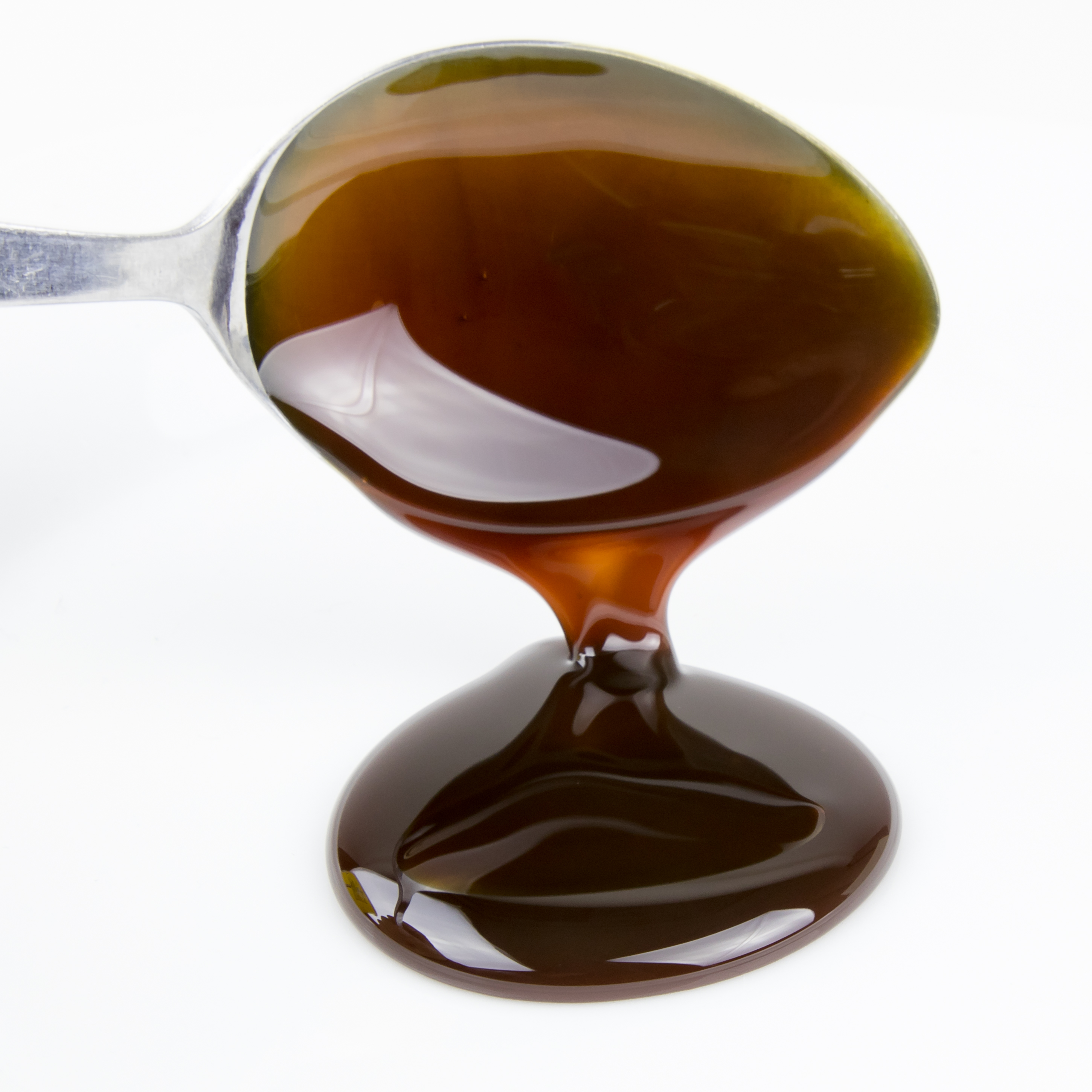 Rübenkraut "Grafschafter Goldsaft" läuft von einem Löffel